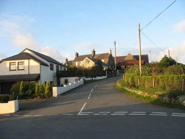 Groeslon y Rhiw. Rhiw Crossroads